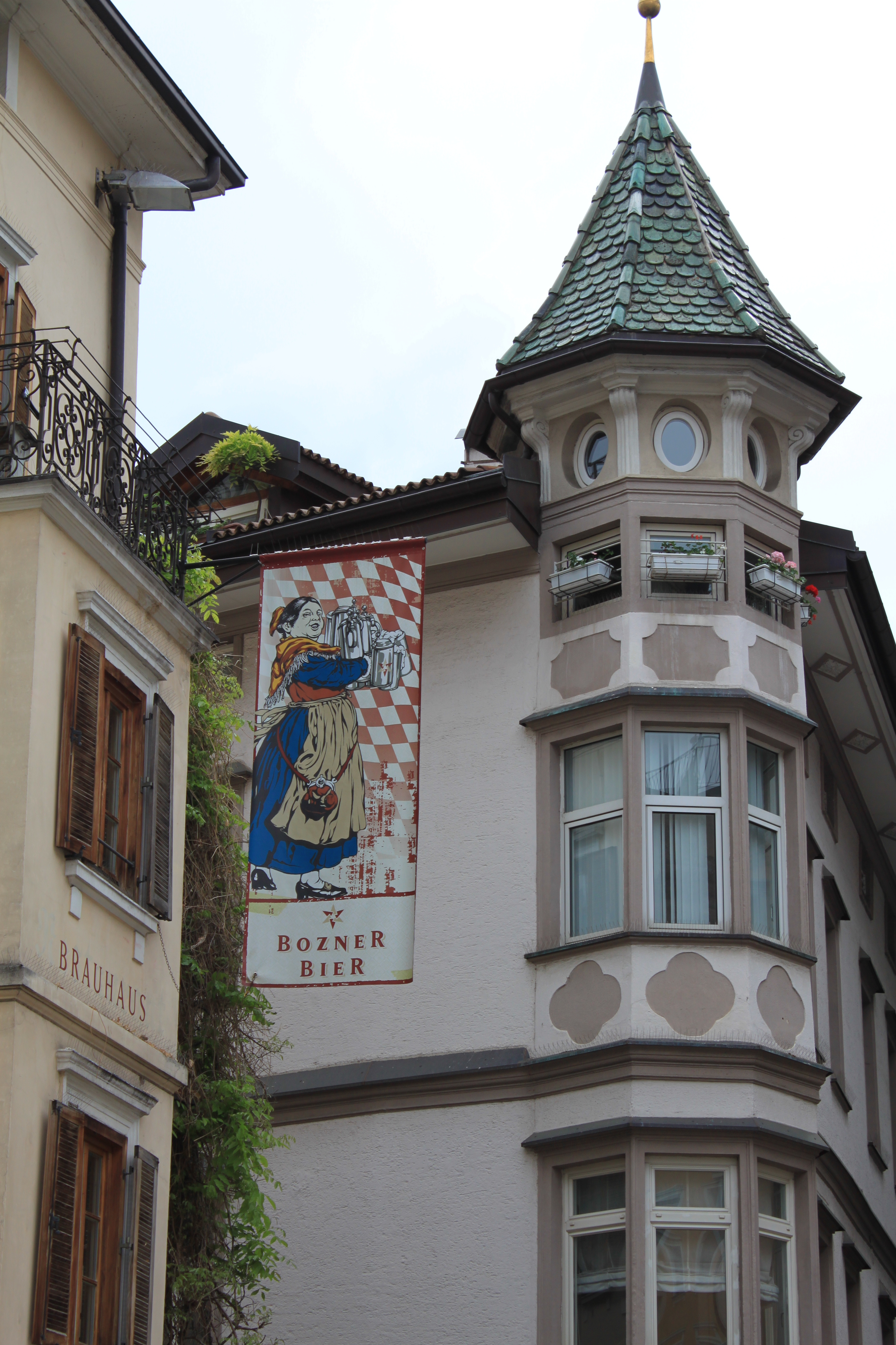 Bozner Bier